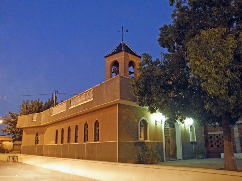 Ermita